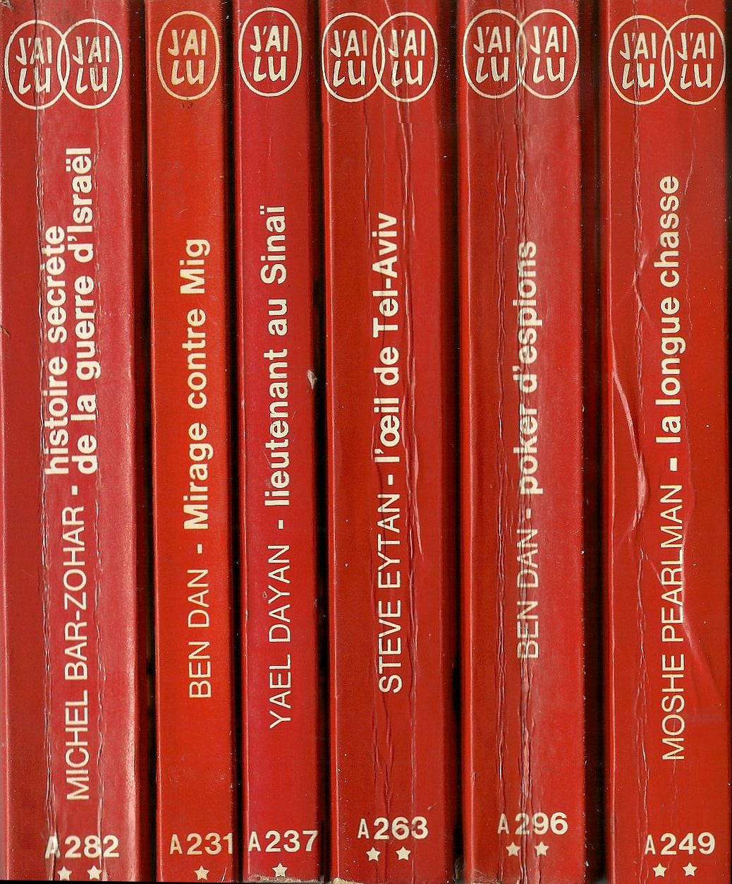 Collection poche 'L'Aventure aujourd'hui' (partie).